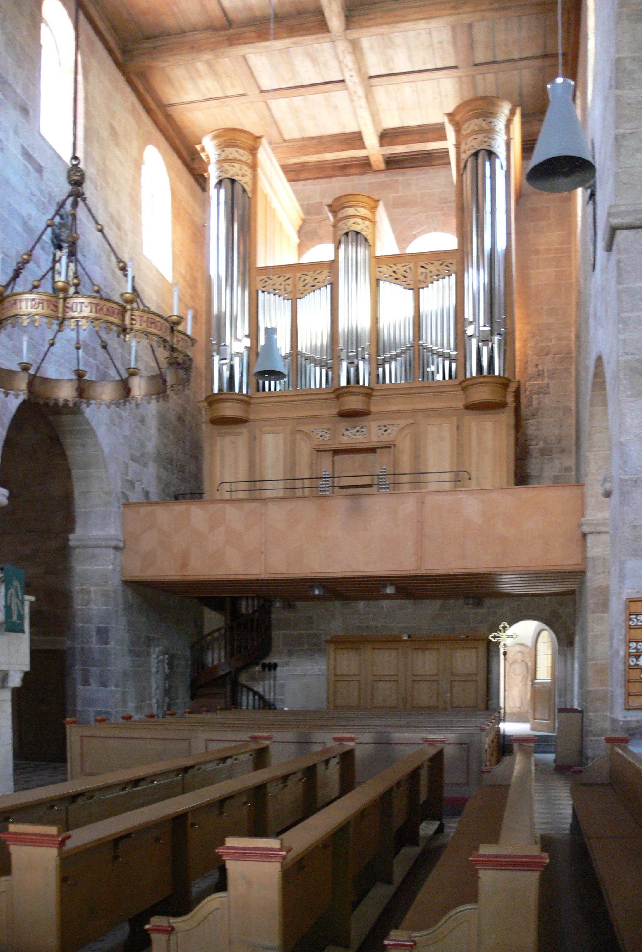 Heilsbronn, Landkreis Ansbach, Münster St. Marien und Jakobus Lutz-Orgel von 2006